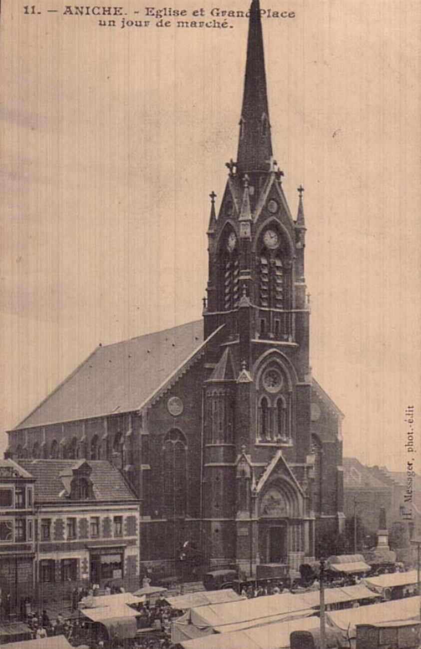 Église avec son clocher, Aniche, Nord, Nord-Pas-de-Calais, France.